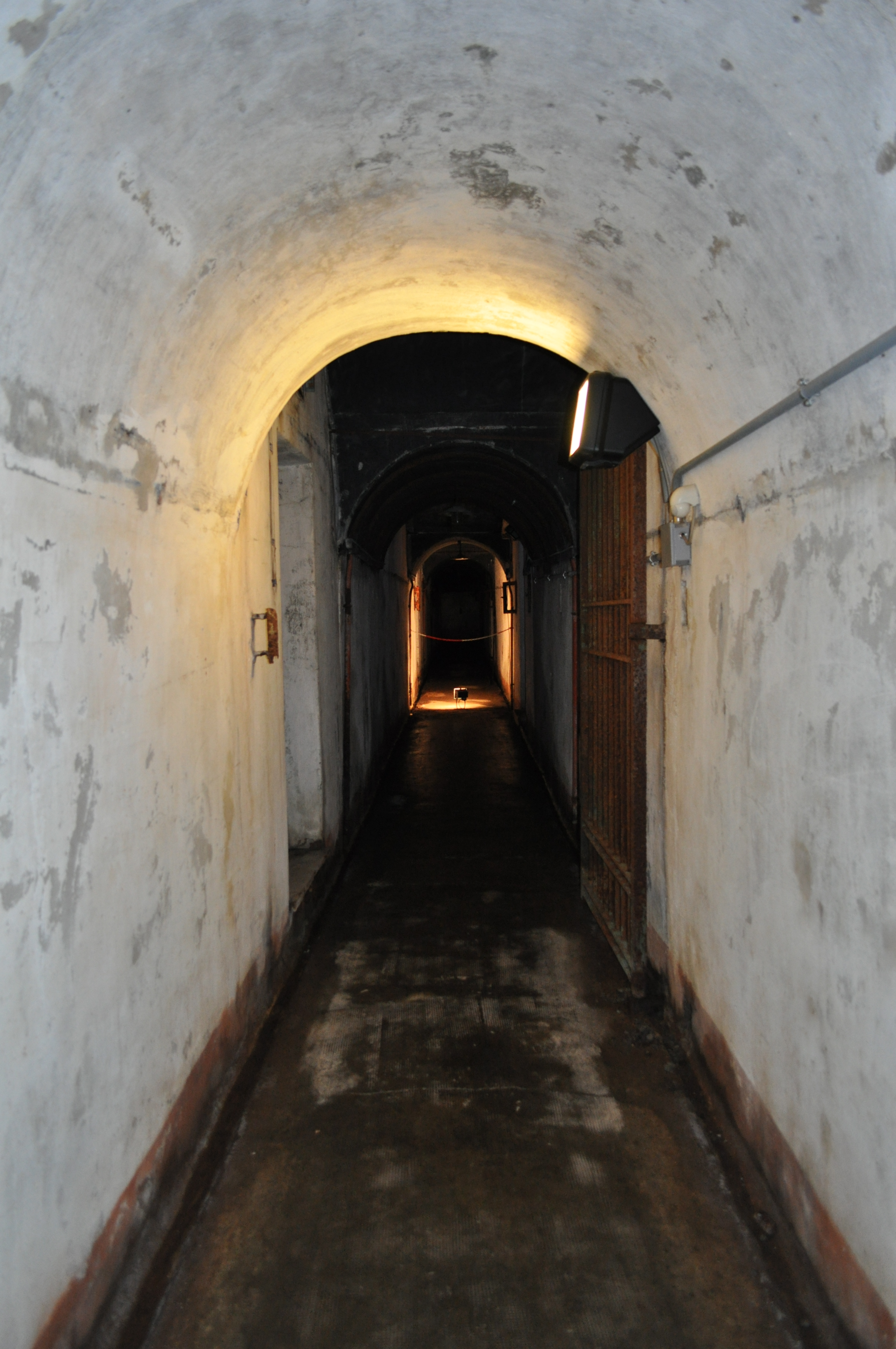 Corridoio della polveriera di forte Montecchio